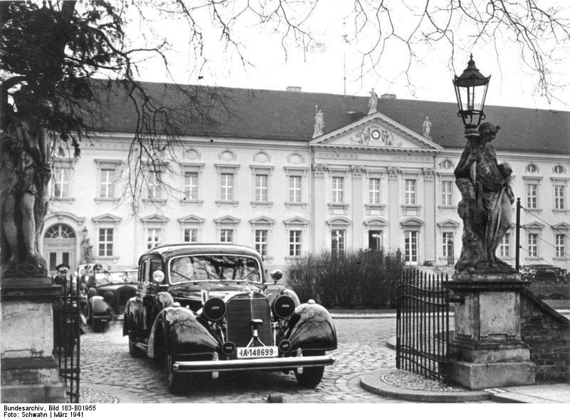 Im Schloss Bellevue, dem Gästehaus der Reichsregierung, während des Matsuoka-Besuchs. Vortext s. B 1946 Ausfahrt des Ministers zum Besuch Potsdams. Fot. Schwahn 30.3.41